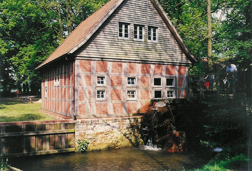 Die Wassermühle im Steinfelder Ortsteil Mühlen.